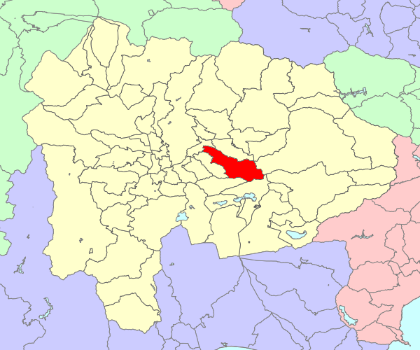 山梨県東八代郡御坂町の位置画像。